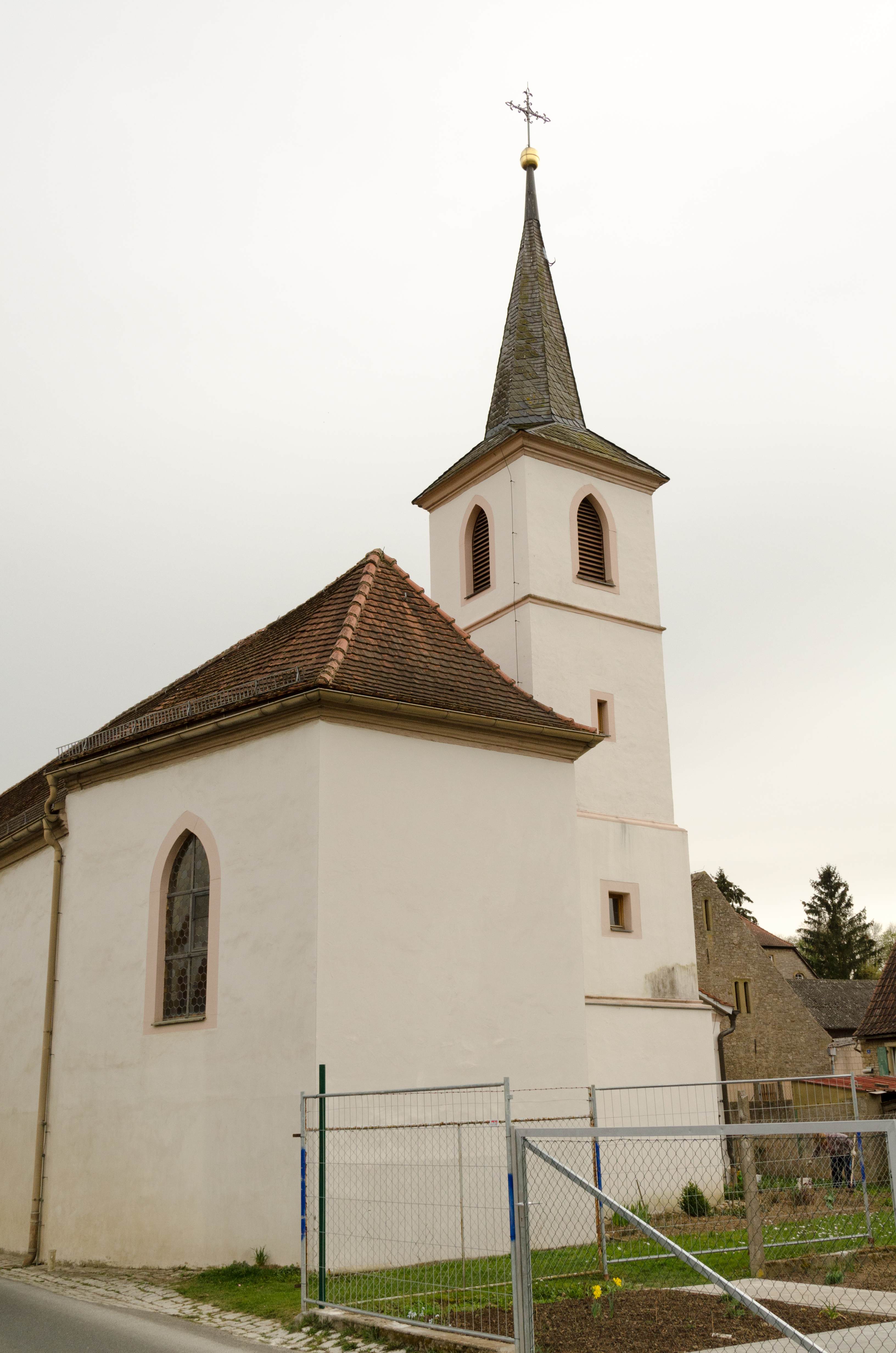 Dettelbach, Neusetz, Katholische Filialkirche Mariae Himmelfahrt, Hll. Kilian, Totnan und Kolonat